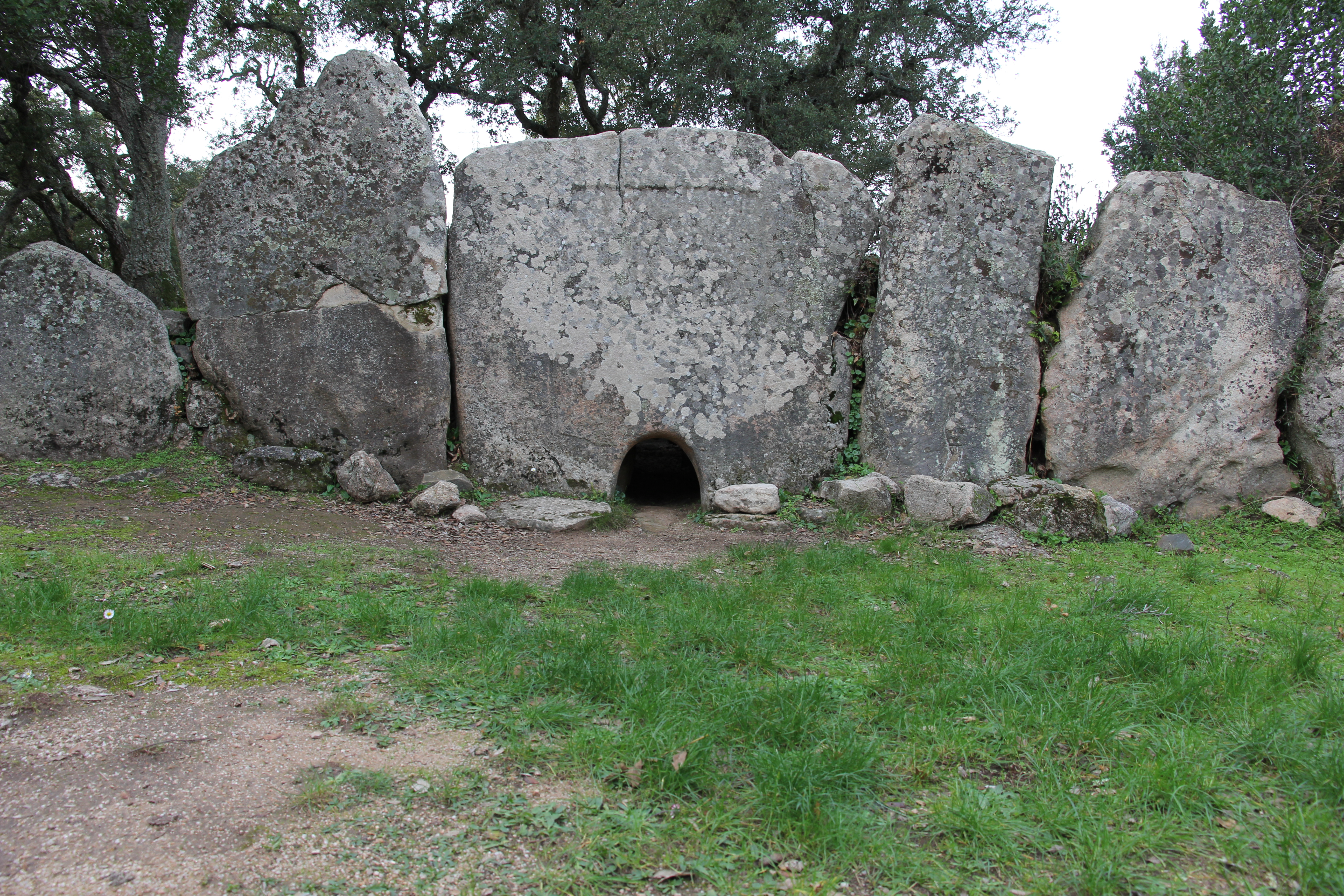 Tomba dei giganti di Pascaredda - m 442 s.l.m.